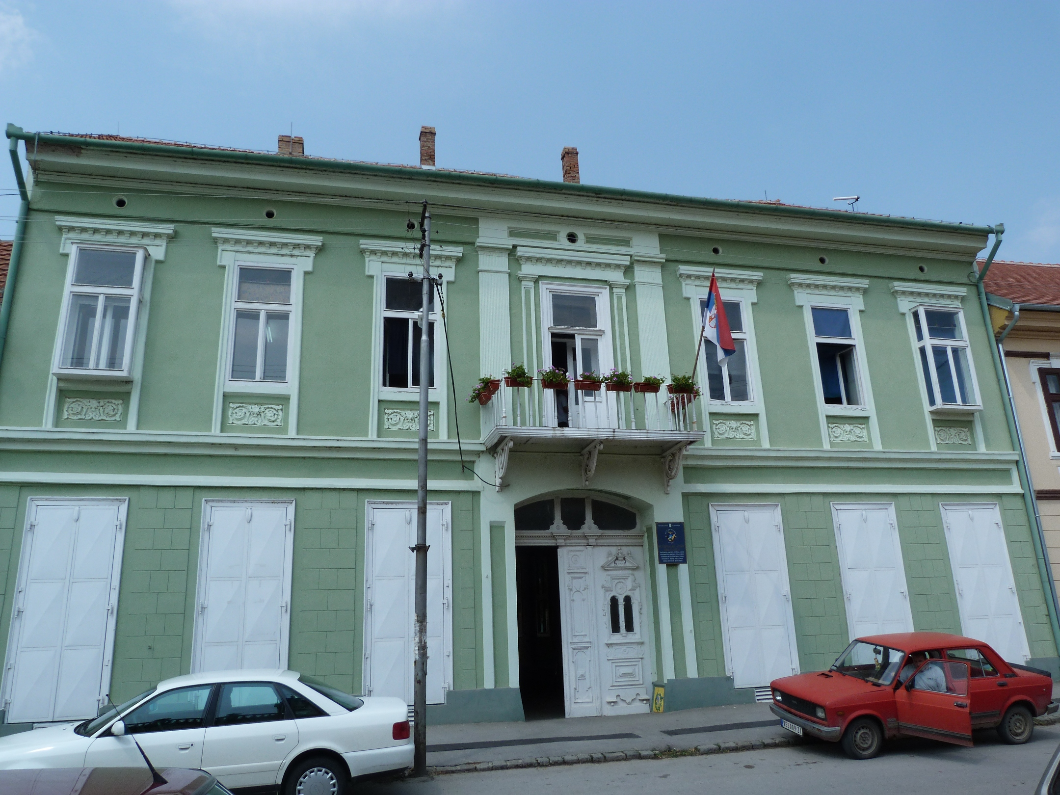 Зграда Историјског архива у Белој Цркви